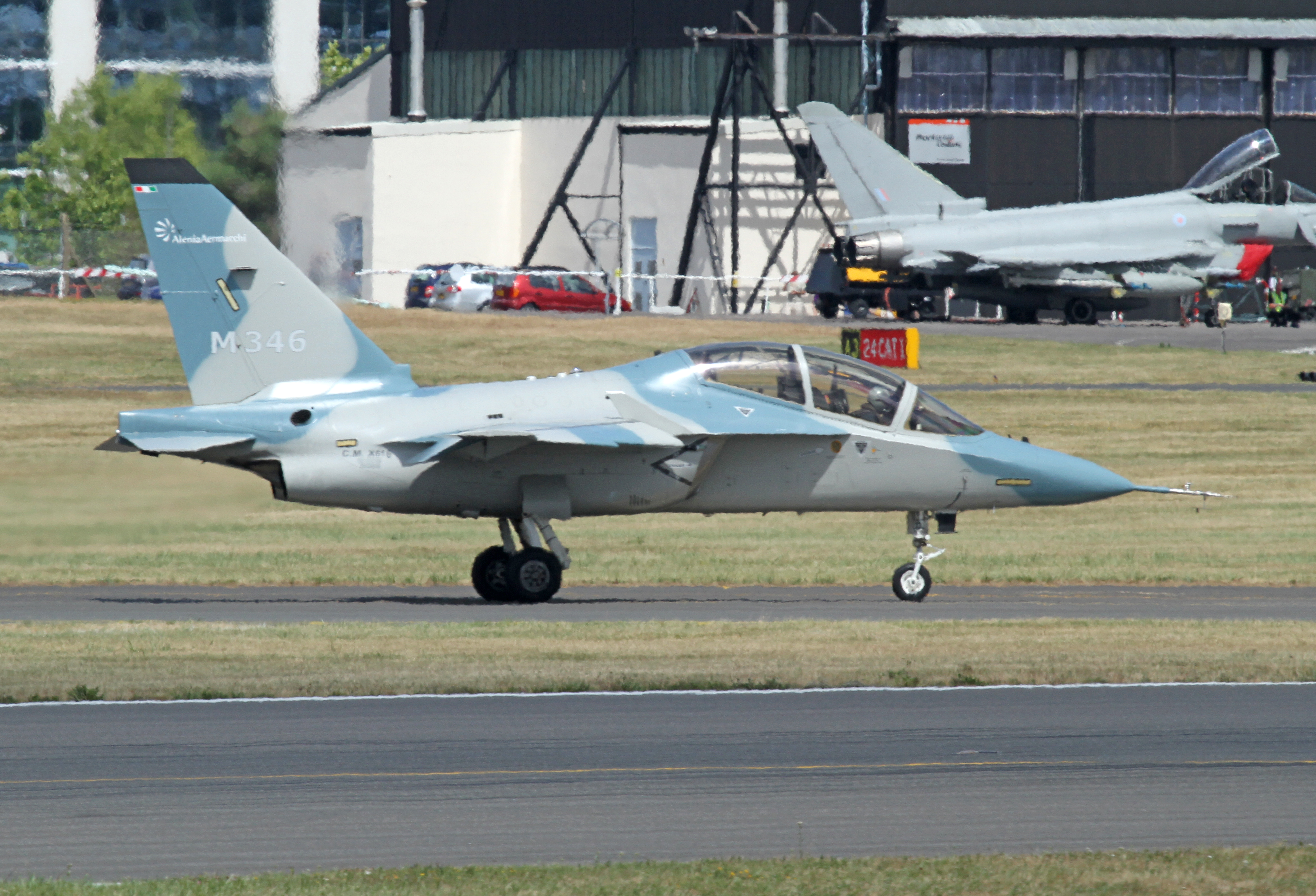 Alenia Aermacchi M346